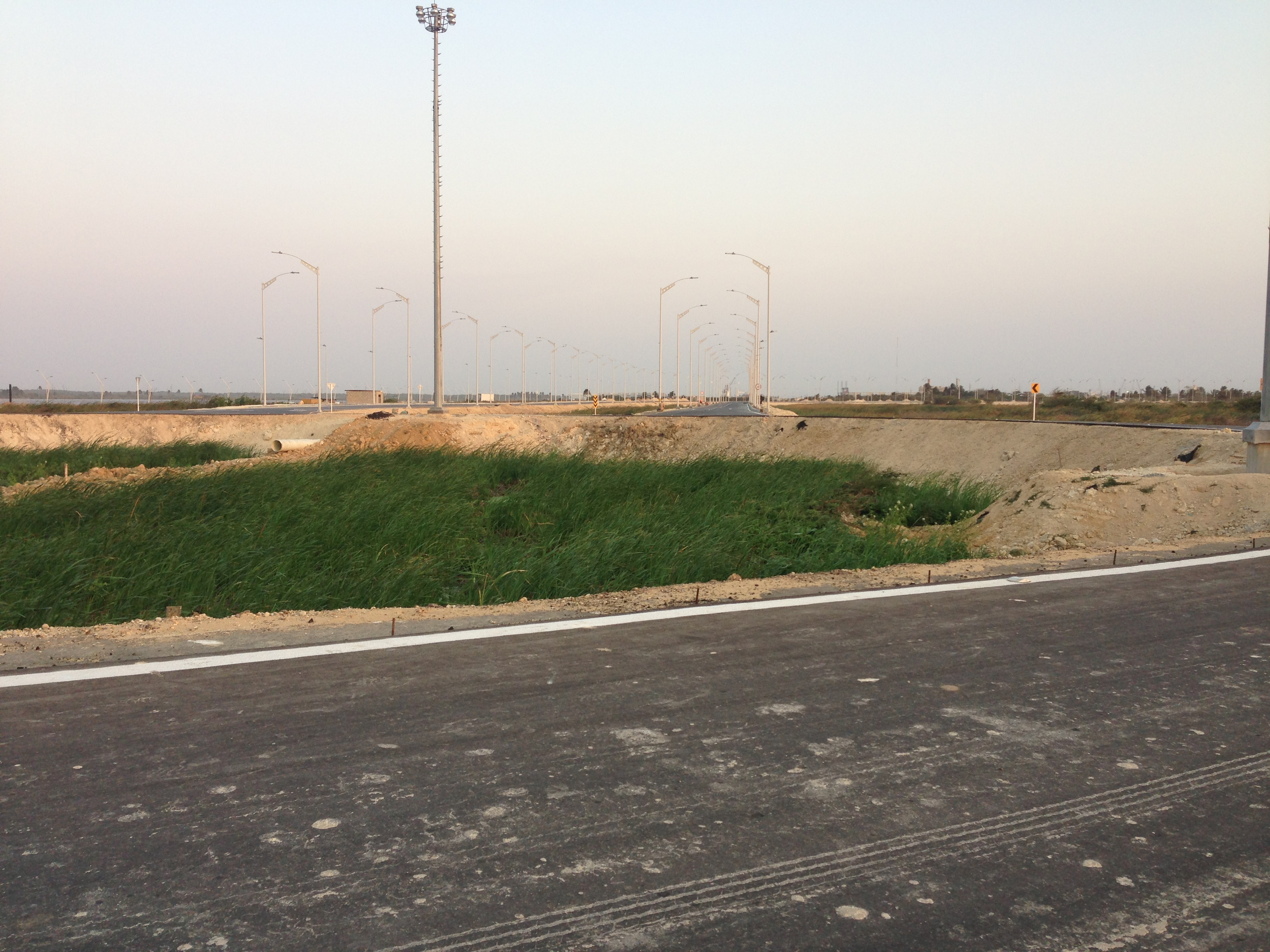 Glorieta final de la avenida del Río